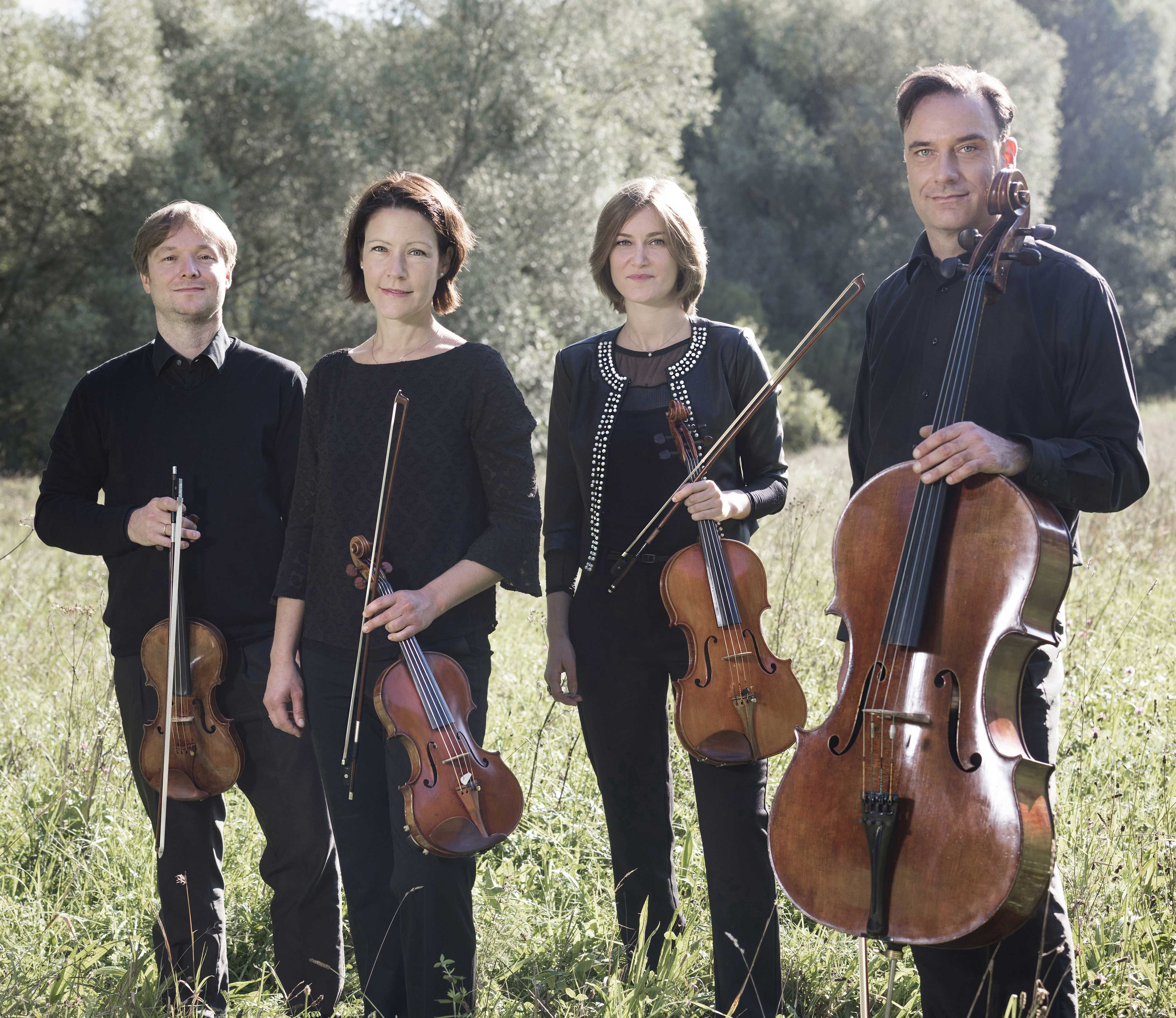 v.l.: Stefan Kirpal, Gundula Kirpal, Alba Gonzalez i Becerra, Stephen Ristau